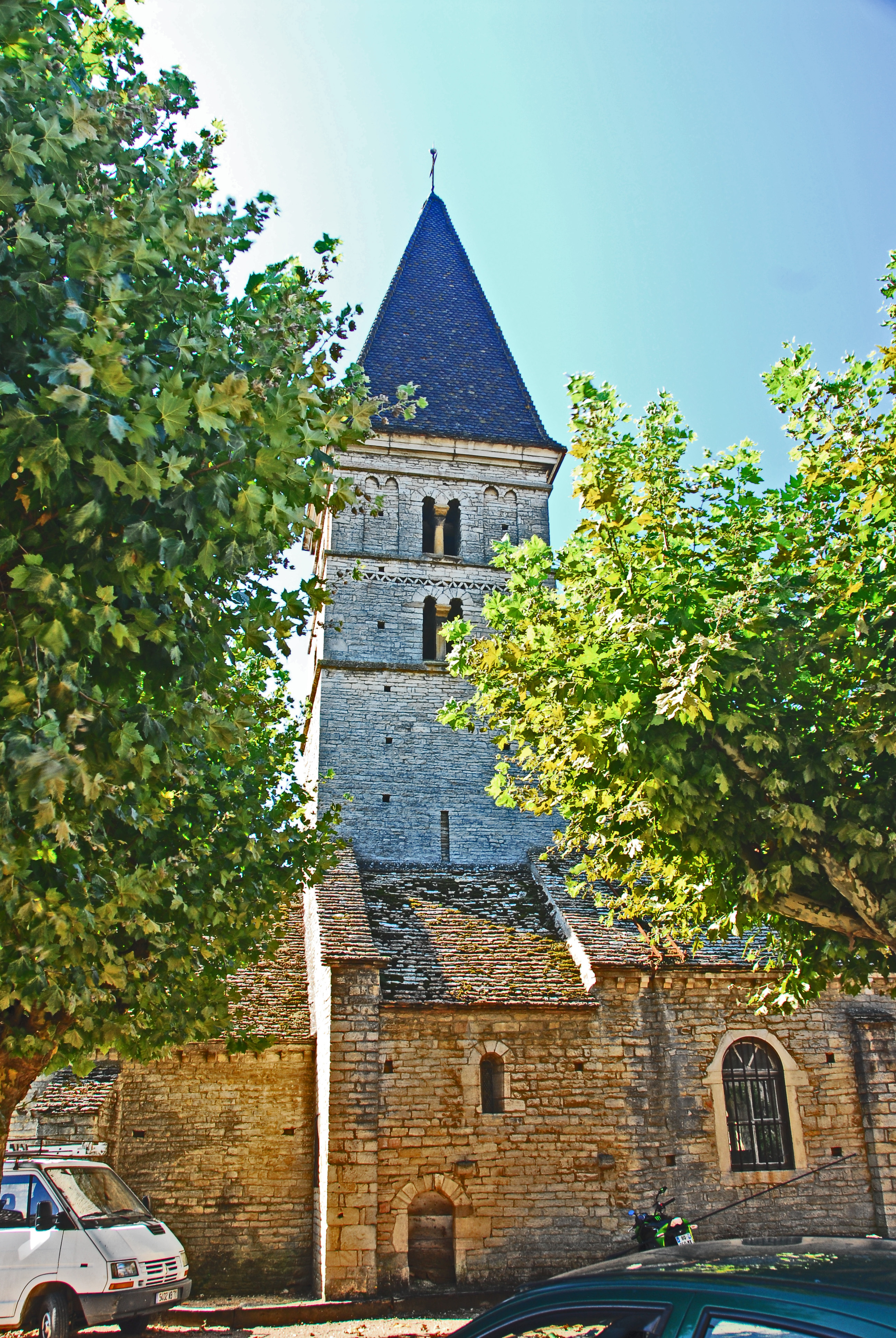 St-Bathélémy, Farges, Turm u. Querhaus von N